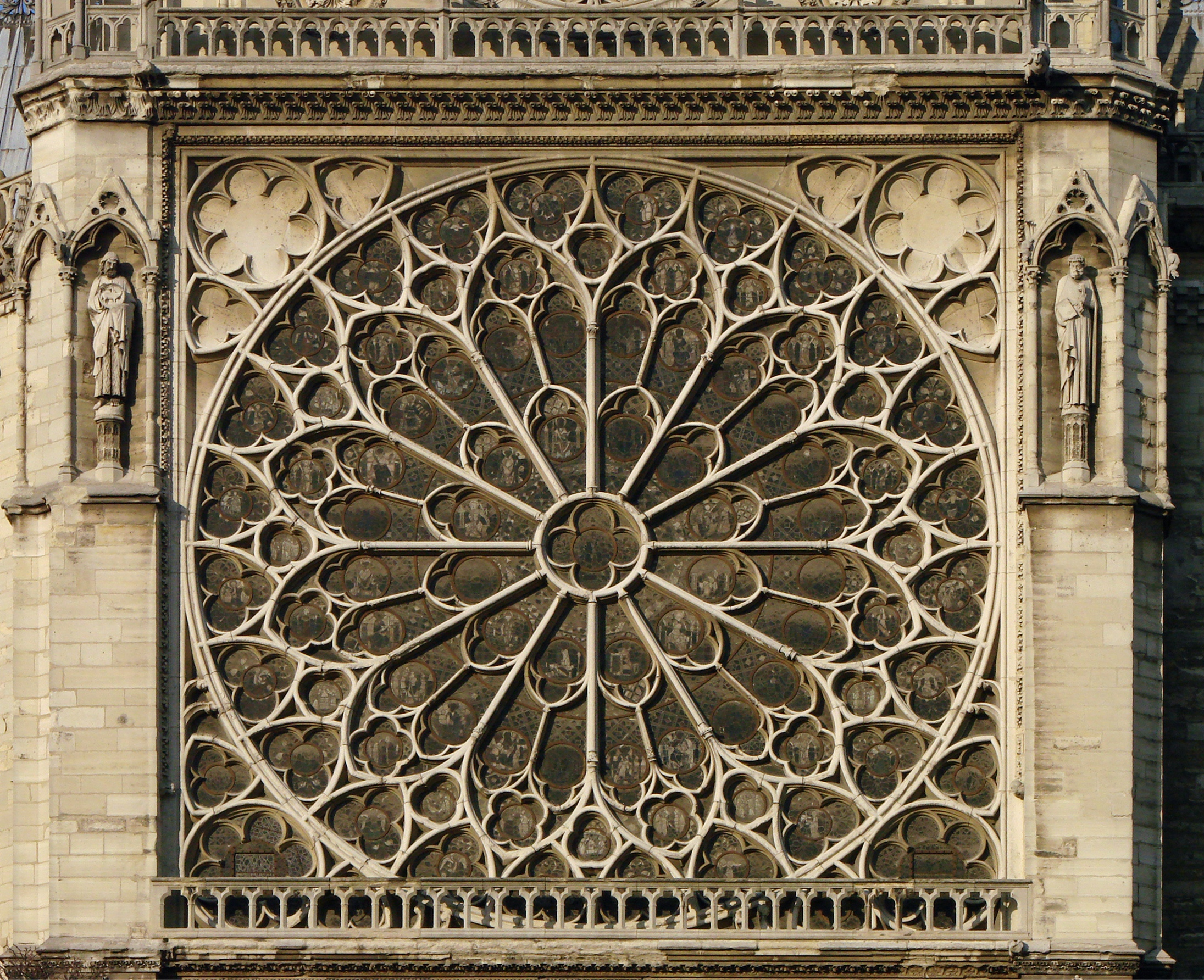 La grande rose du transept Sud de la cathédrale Notre-Dame de Paris.